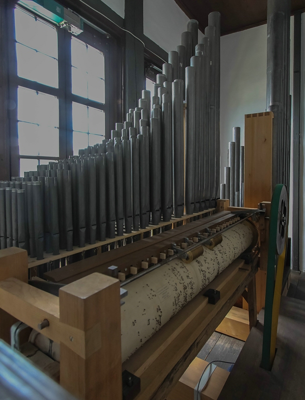 Salzburg: Festung Hohensalzburg, Orgel im Krautturm: der Salzburger Stier